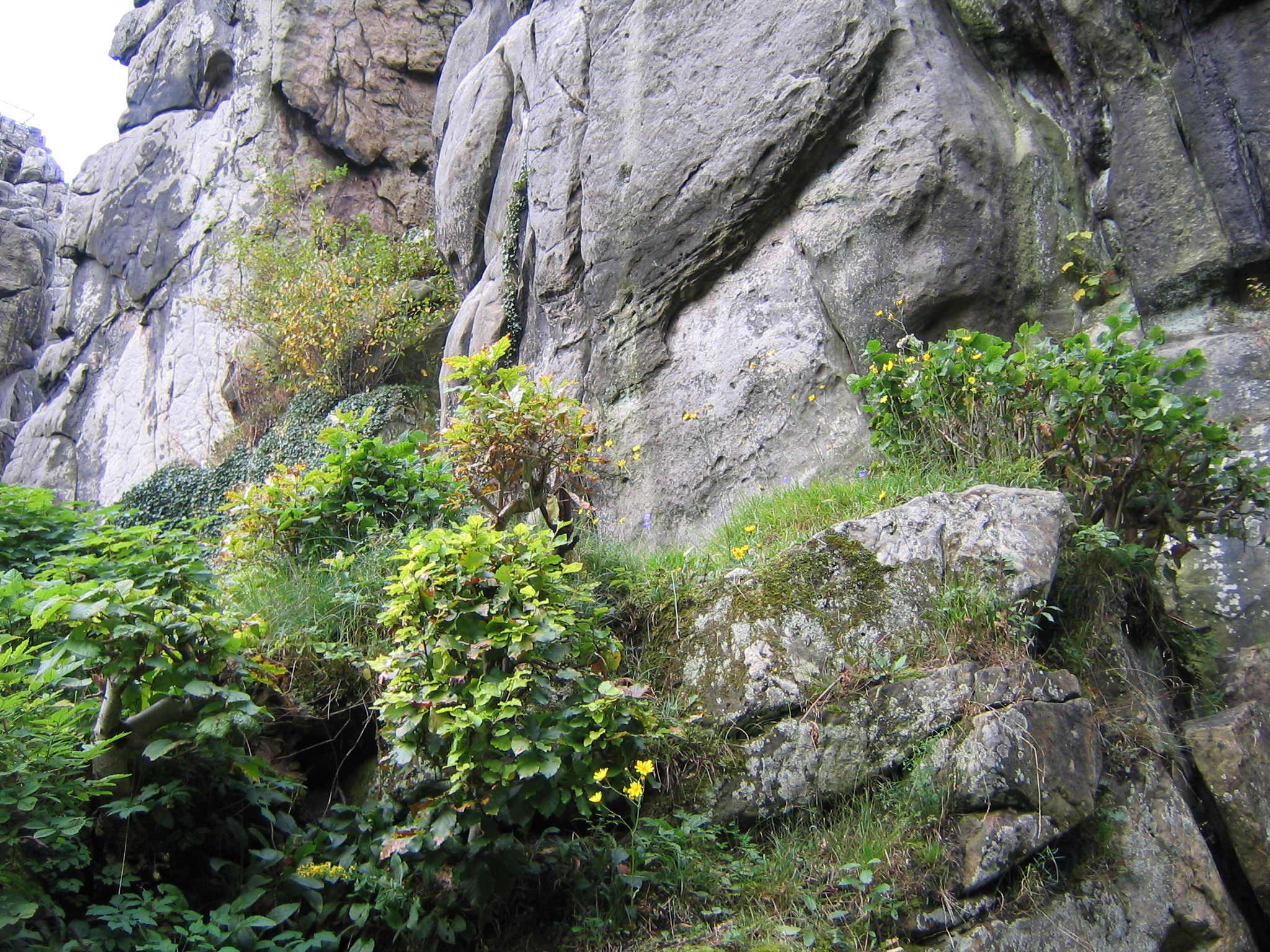 Felsen der Externsteine